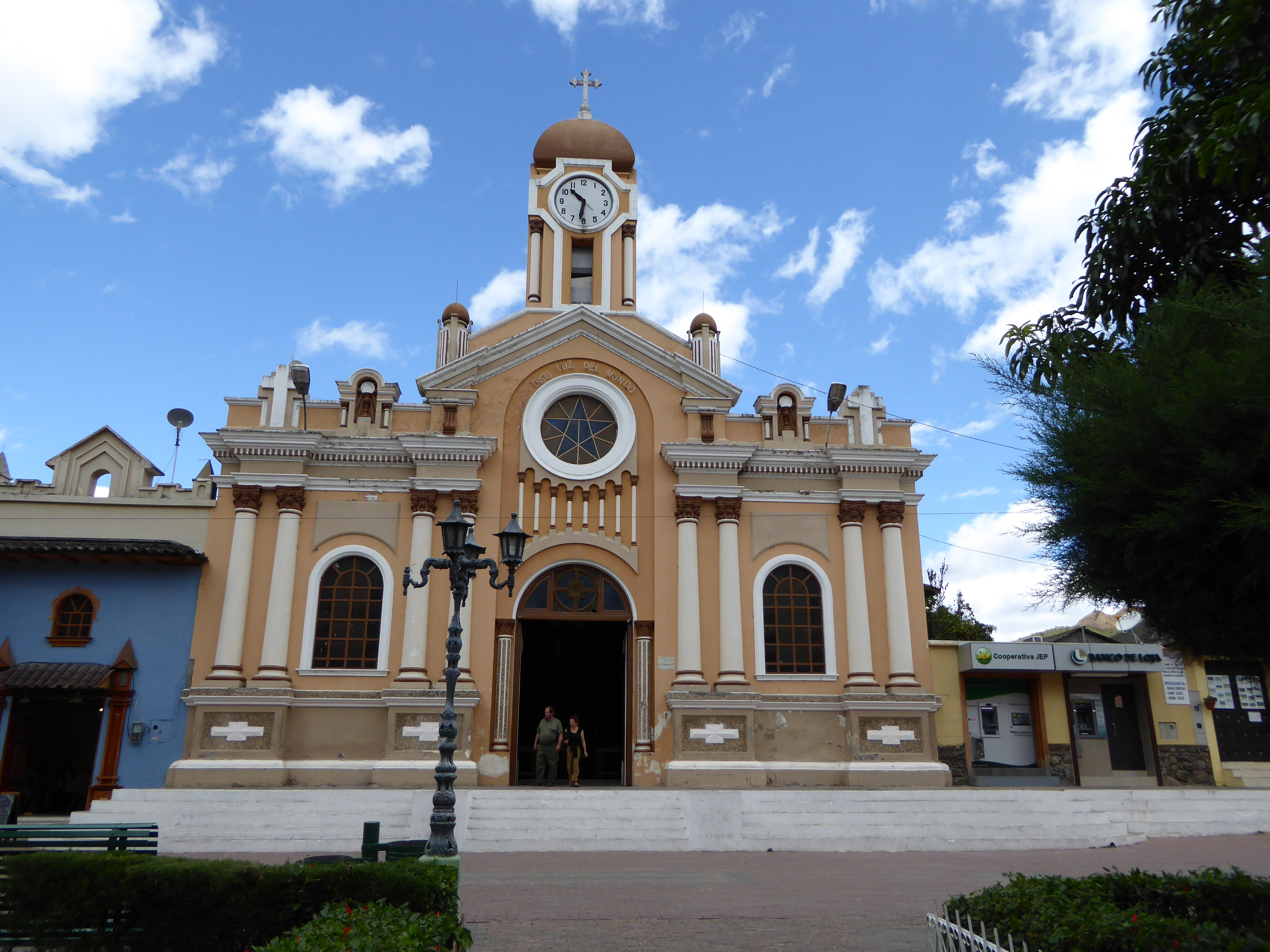 Im Ort Vilcabamba